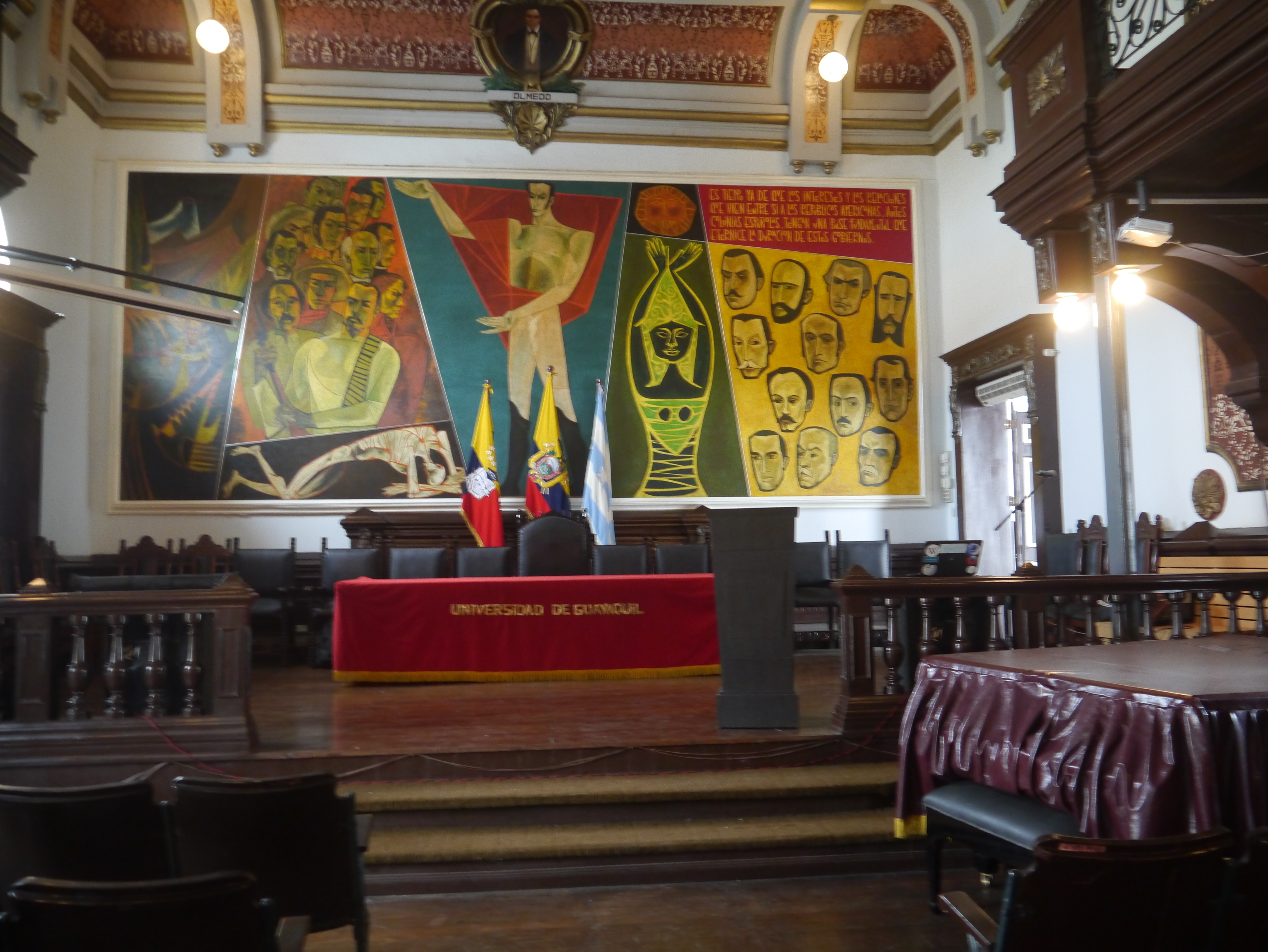 Imágenes de la Casona Universitaria Pedro Carbo de Guayaquil